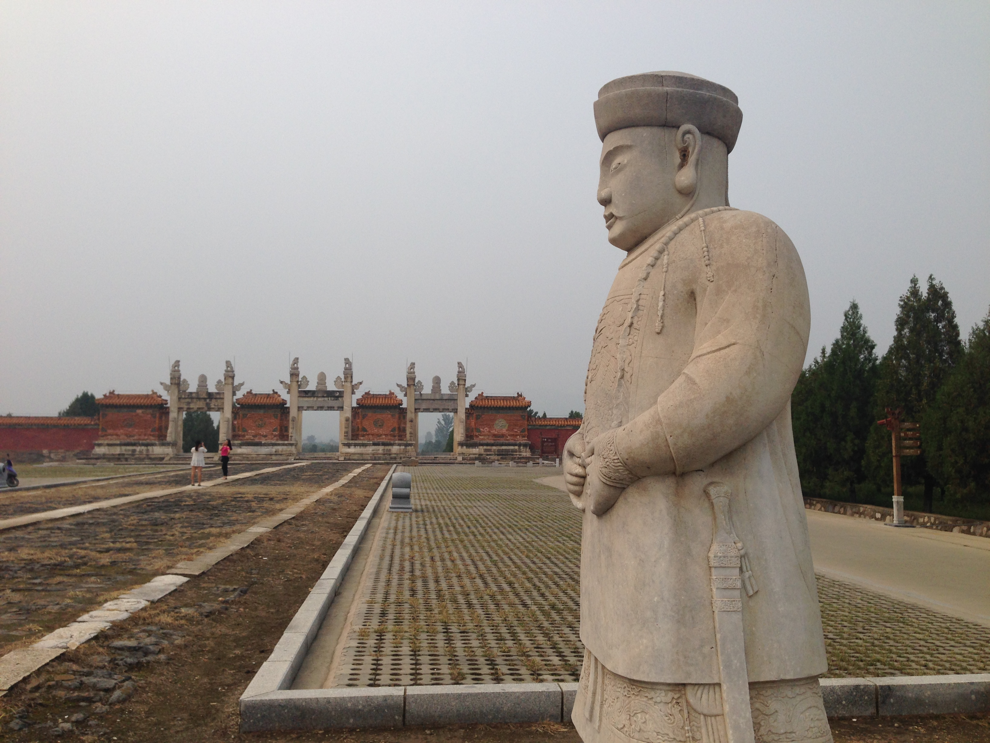 Staty längs processionsvägen med Drake och fenixporten i bakgrunden